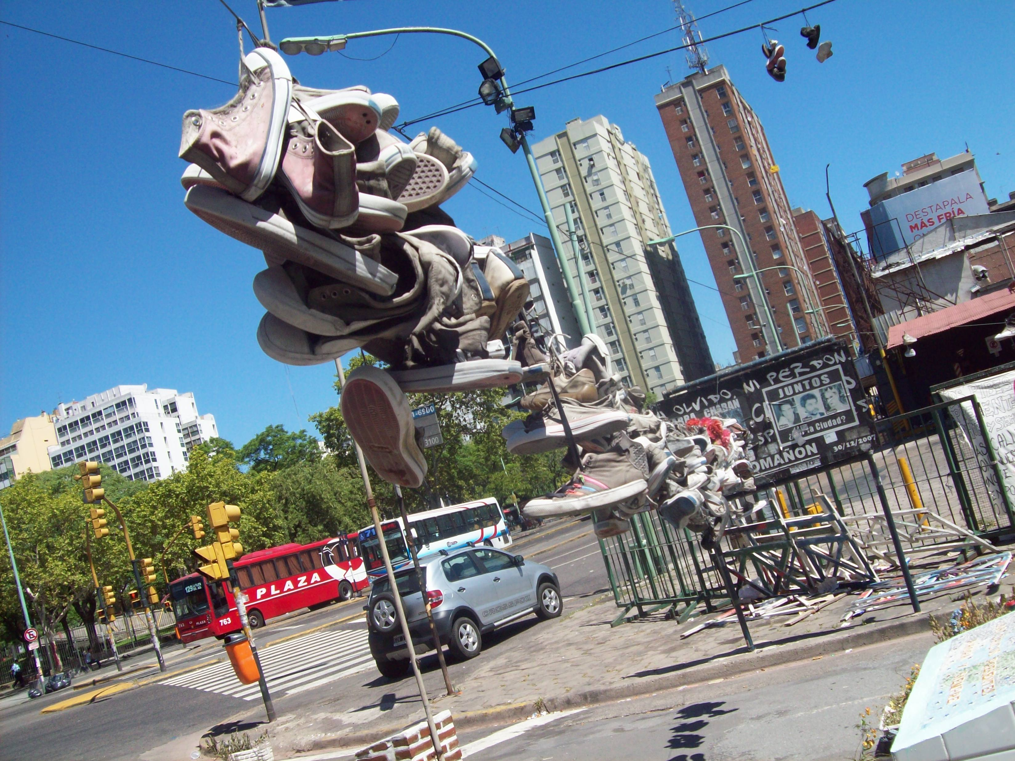 Plaza de la memoria, República Cromañón. Zapatillas de las víctimas.